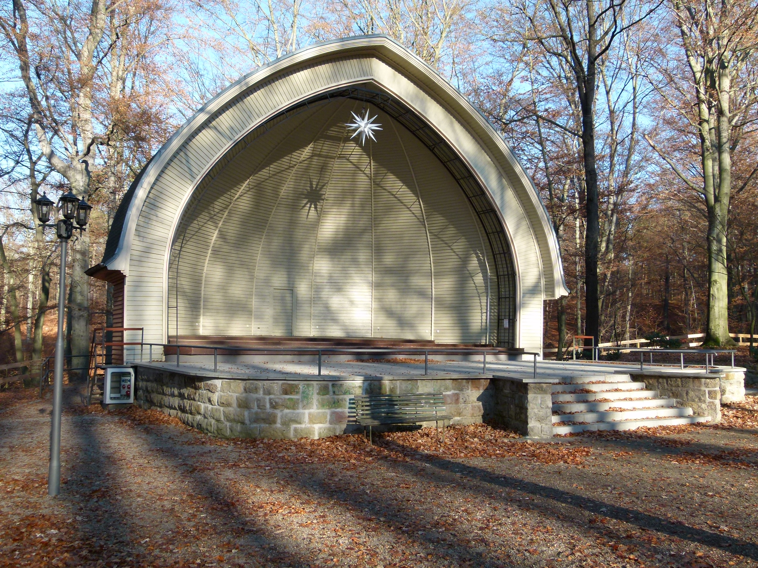 Konzertplatz, Kurparkstraße, Weißer Hirsch, Dresden